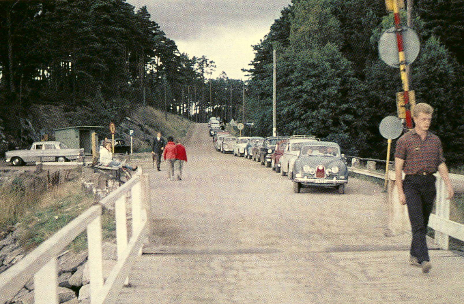 Bilkö i väntan på färjan på Djurösidan, det fanns bara plats för åtta bilar.